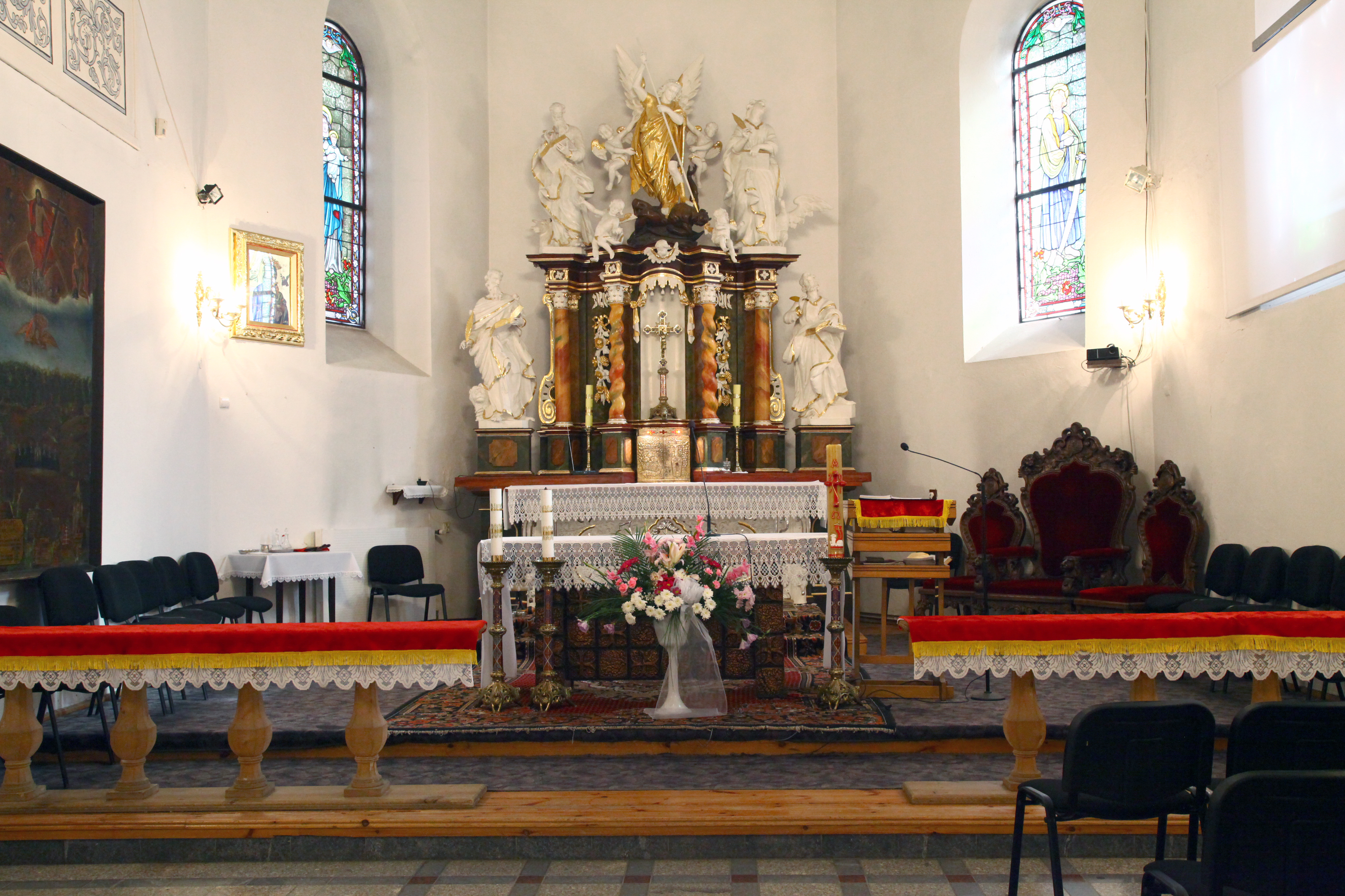 Ołtarz główny w kościele parafialnym p.w. św. Michała Archanioła w Polkowicach.